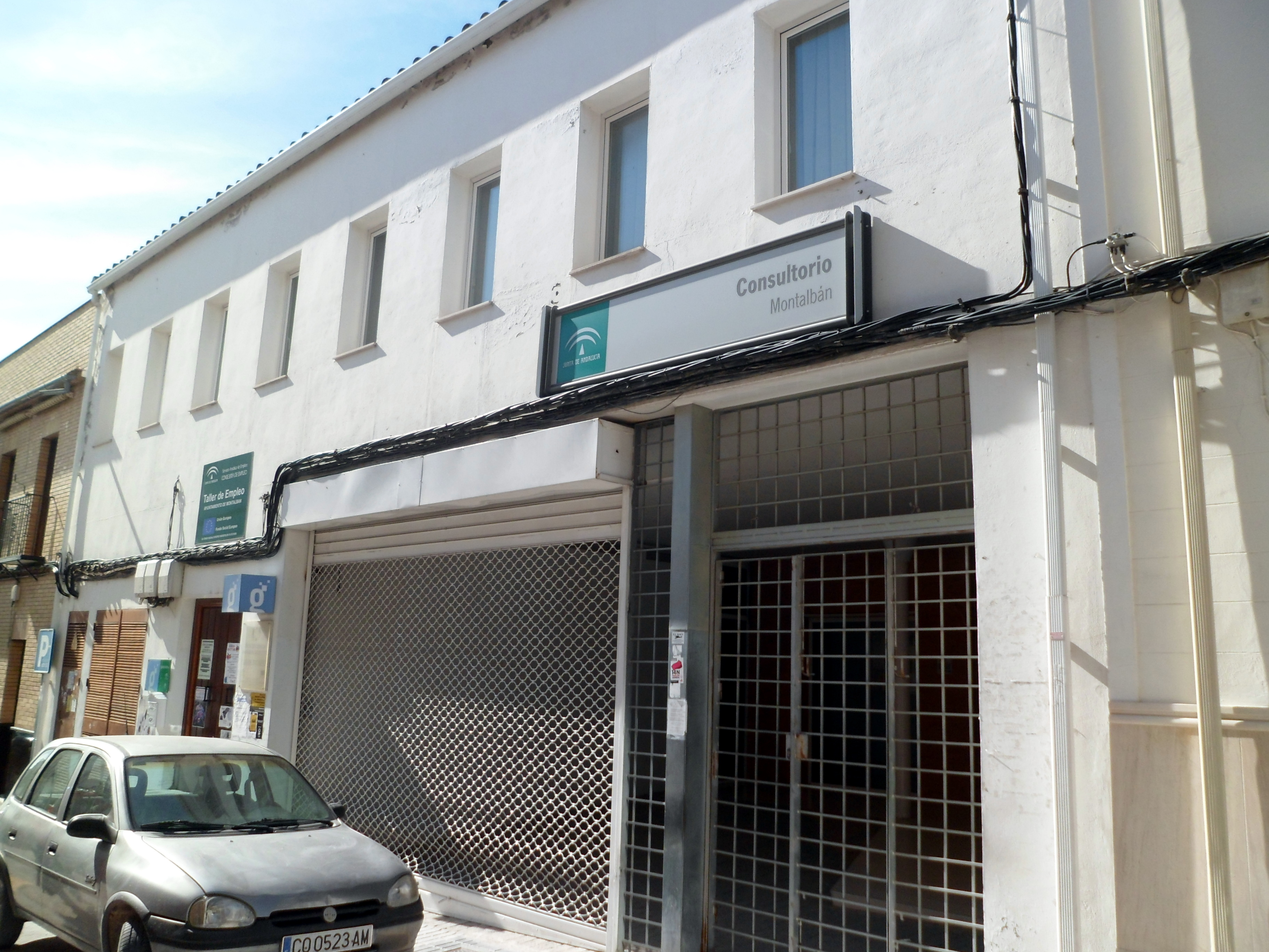 Centro de Salud "Natividad Cabrera", Montalbán de Córdoba (España).